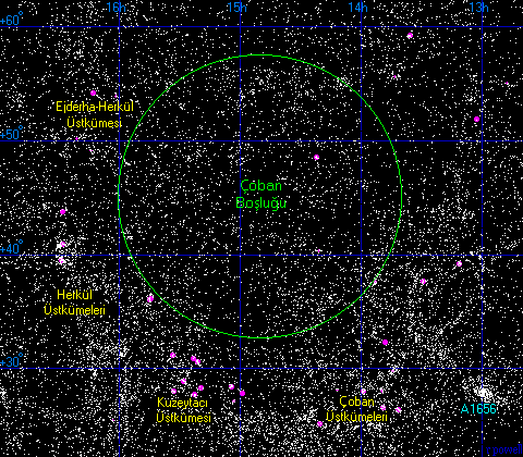 Çoban boşluğunu ve komşu süperkümeleri gösteren harita.